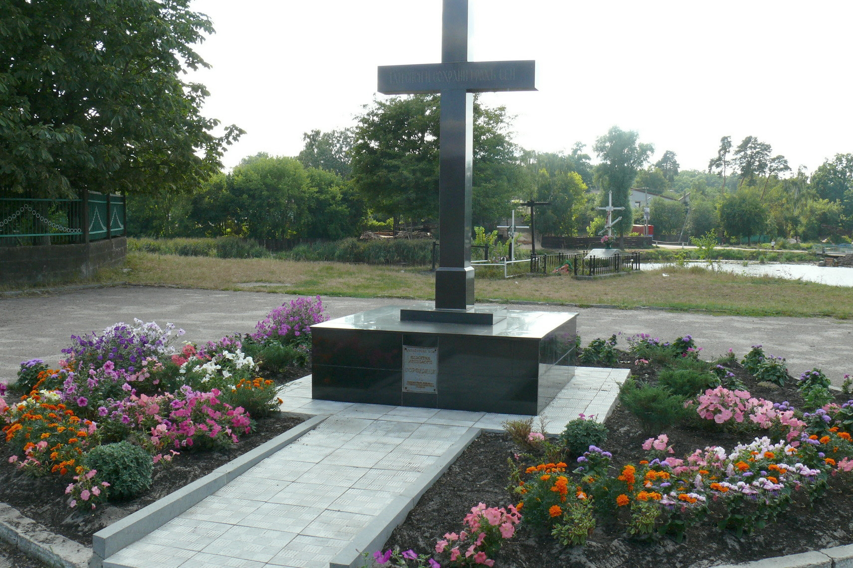 Боярка. Городище. Археологический памятник